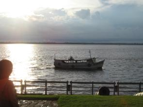 Descrição: Barco sobre o Rio Guamá Fonte/Créditos: minha autoria, criado por Davi Valle Licença